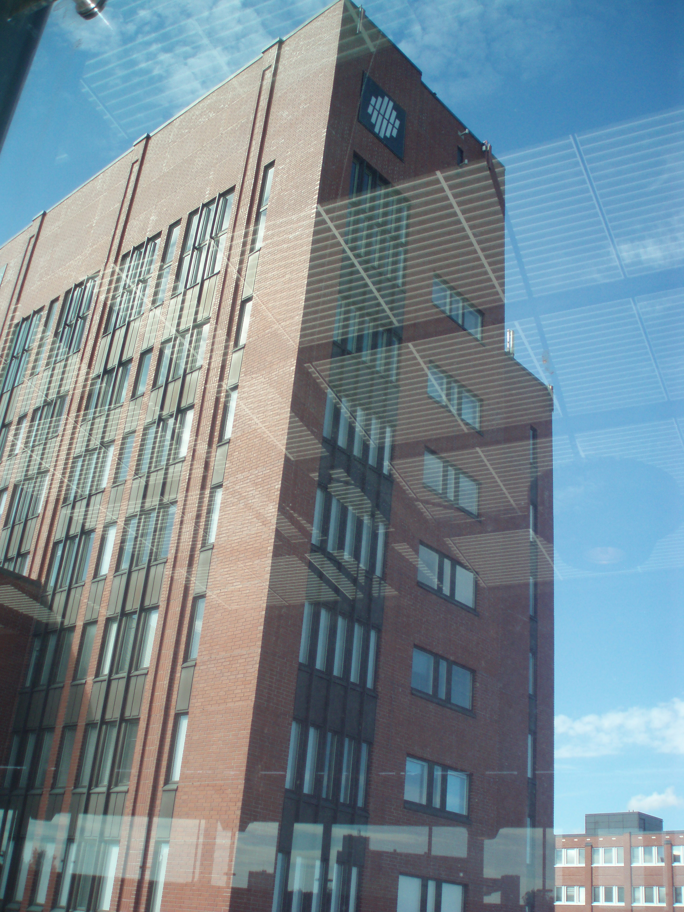 Tilastokeskuksen toimitalo Kalasataman metron suunnasta.